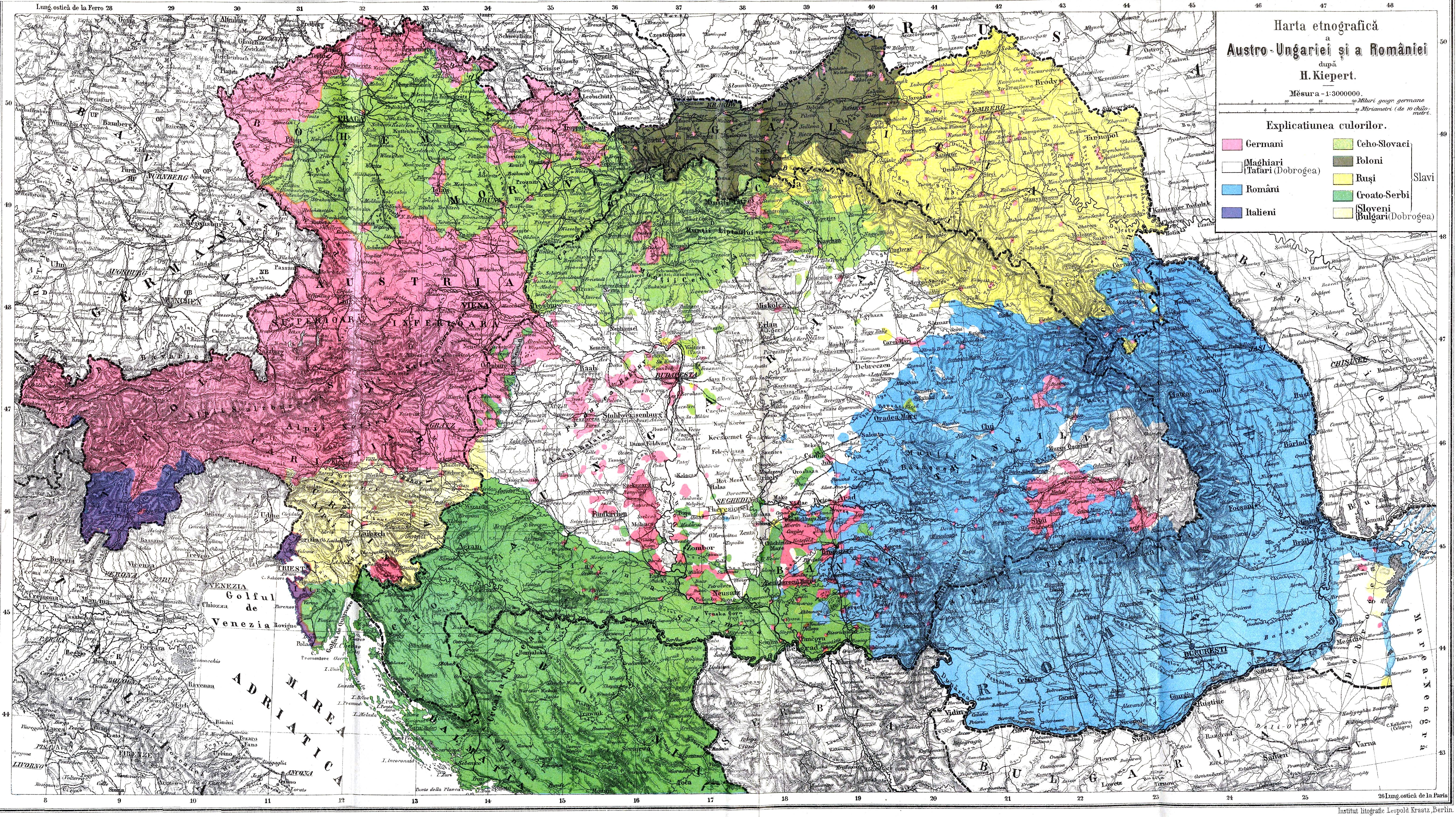 Harta etnică a Austro-Ungariei şi a României